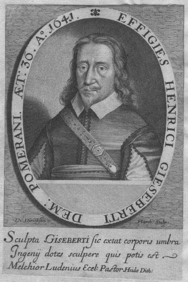 Zeitgenössisches Porträt des Heinrich Giesebert